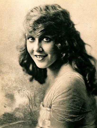 June Caprice